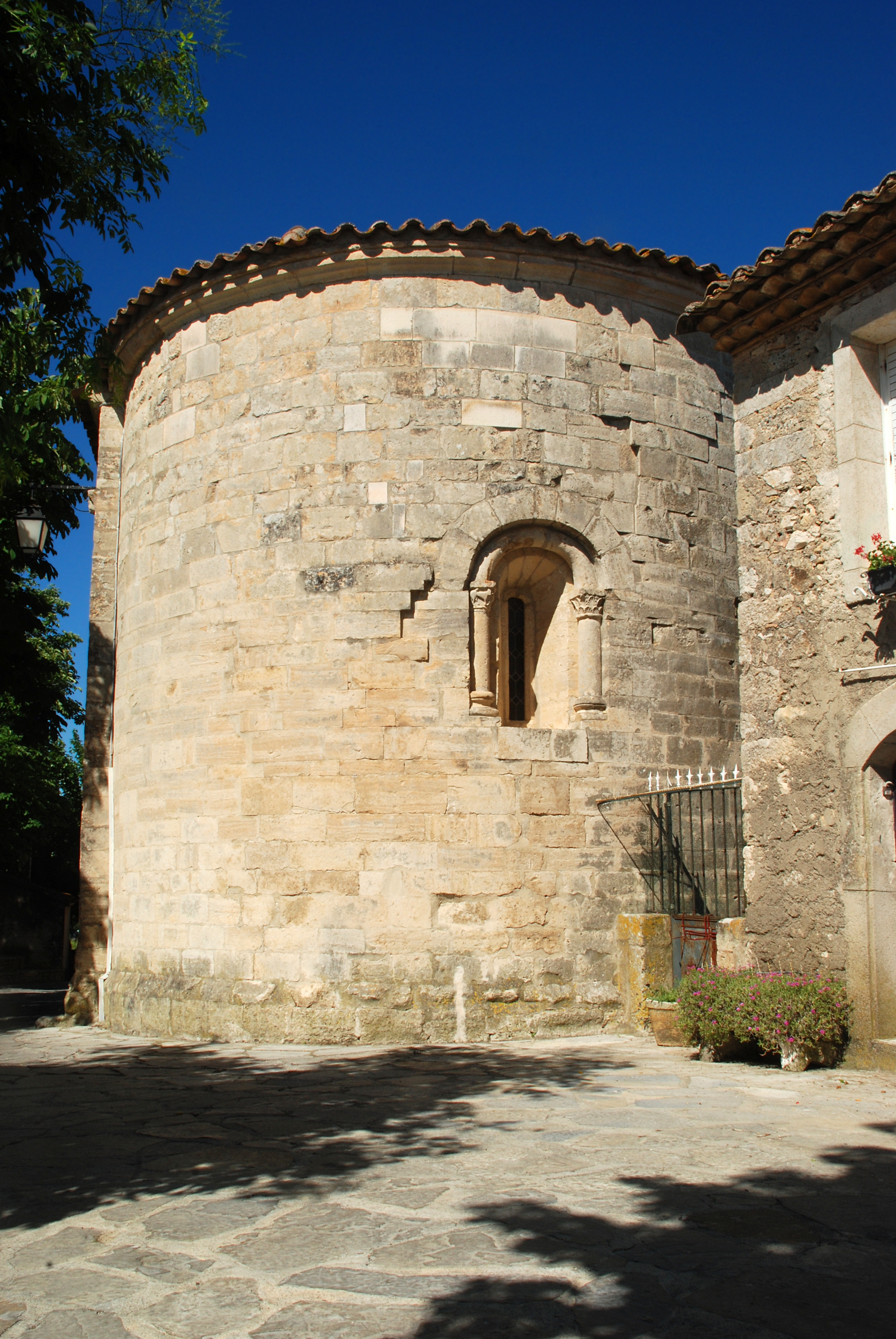 France - Hérault - Église Saint-Michel de Guzargues